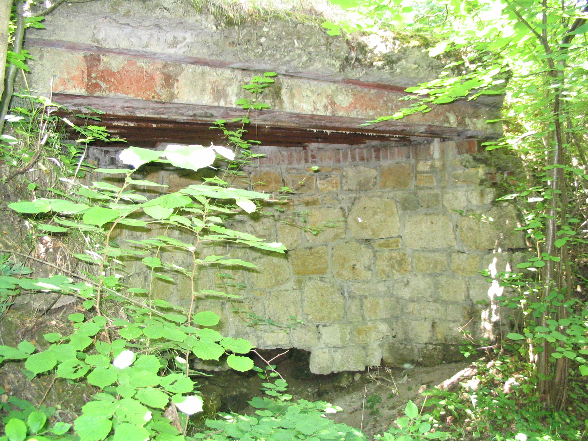 Fort VI "Helicha" Author: Goku122